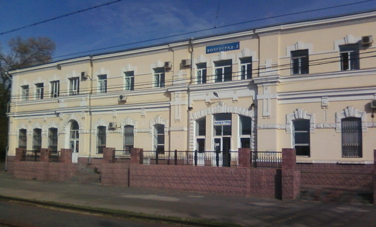 Фотография станции Волгоград-2